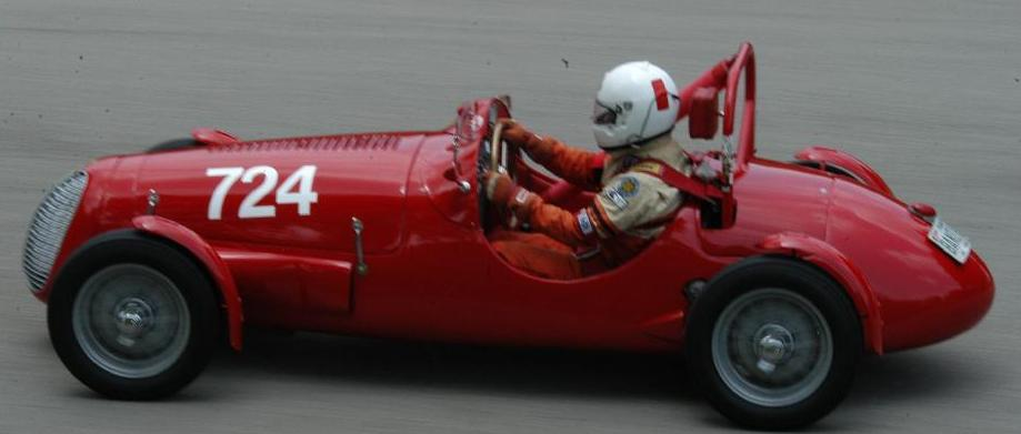 bandini 1100 siluro foto personale 2000